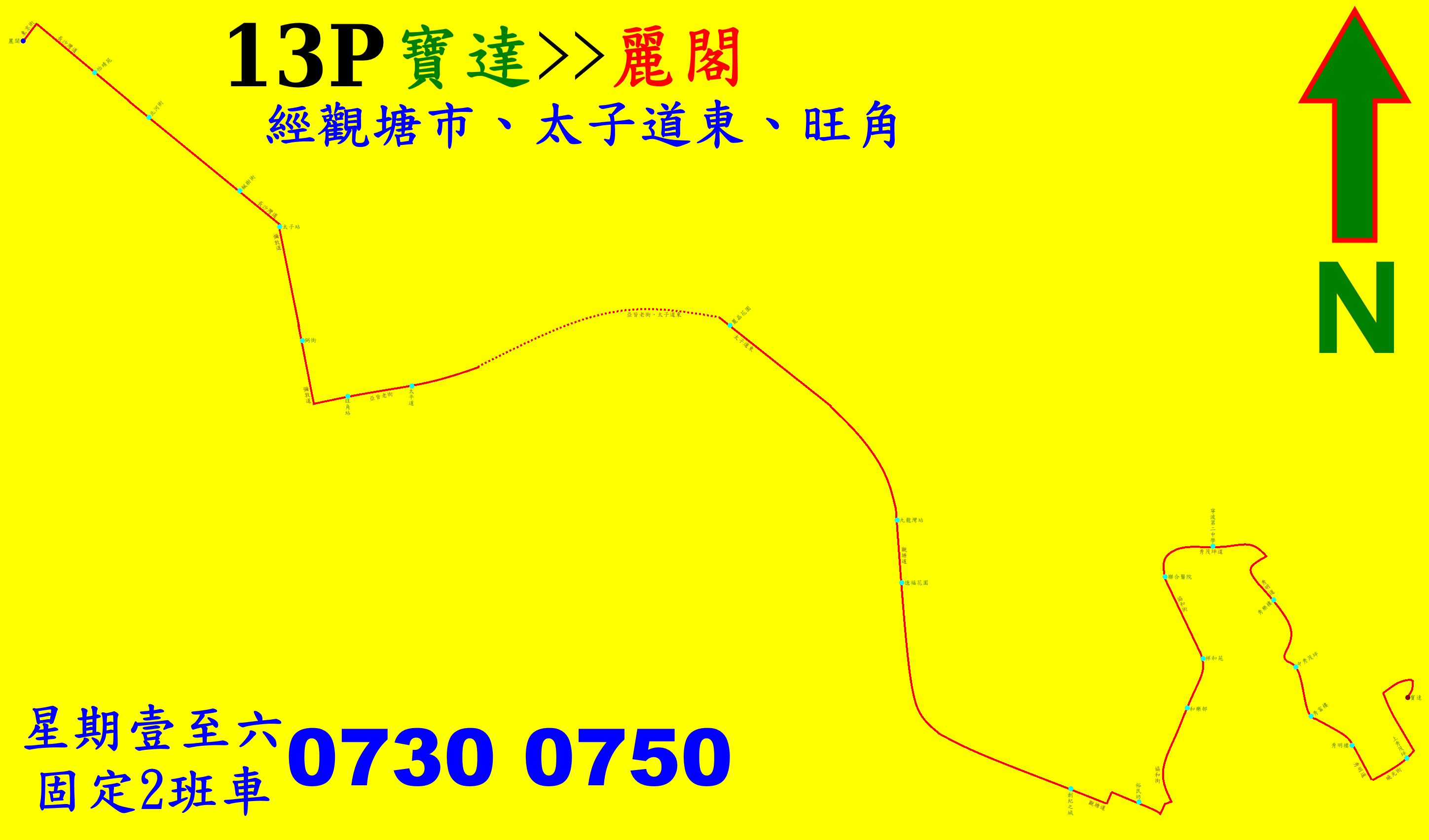 中文（香港）: 九巴13P線的走線圖